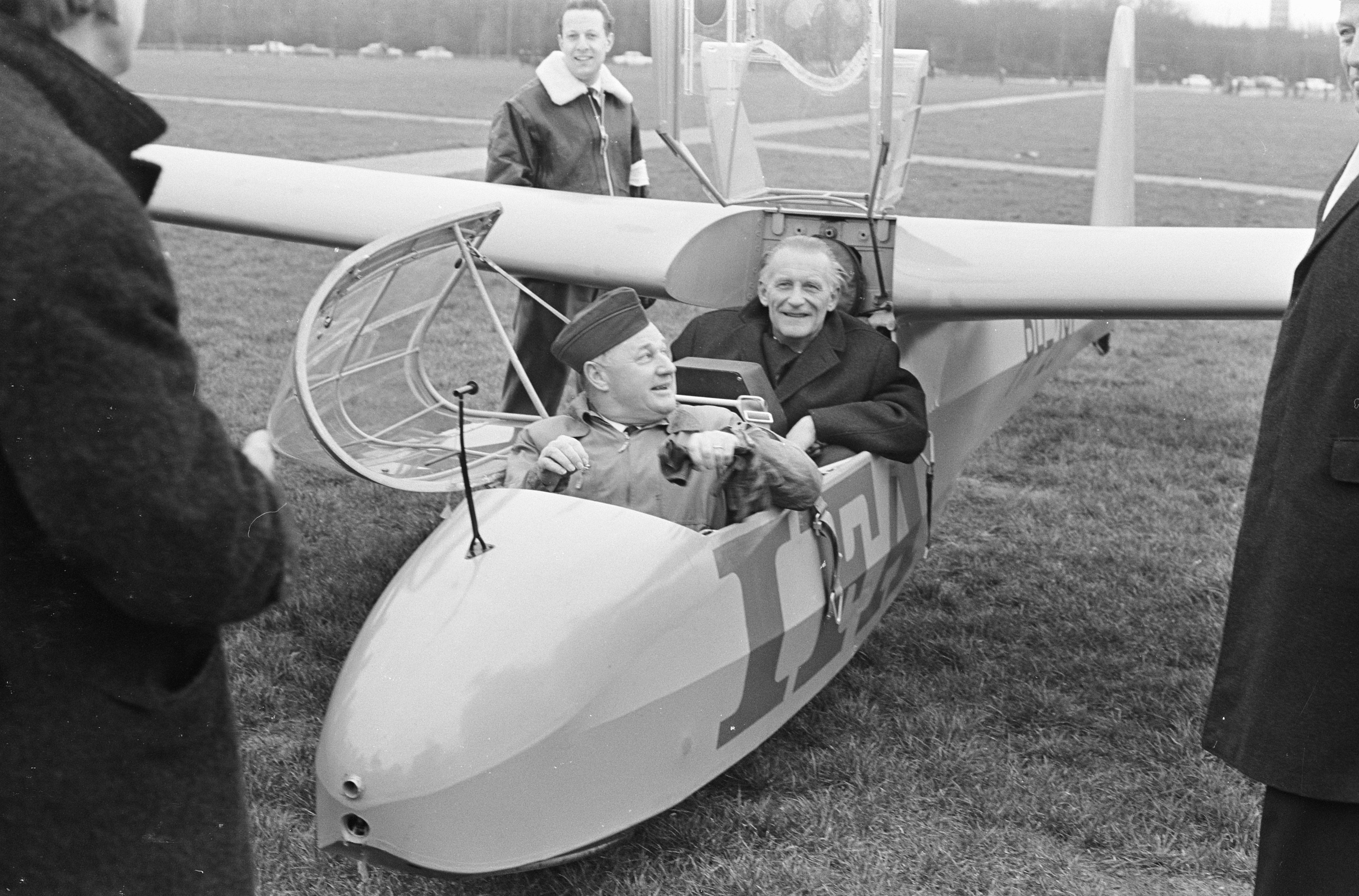 Collectie / Archief : Fotocollectie Anefo Reportage / Serie : [ onbekend ] Beschrijving : Minister Klompe opende tentoonstelling Zwevende kunst Datum : 4 maart 1967 Trefwoorden : tentoonstellingen Persoonsnaam : Klompé, Marga Fotograaf : Nijs, Jac. de / Anefo Auteursrechthebbende : Nationaal Archief Materiaalsoort : Negatief (zwart/wit) Nummer archiefinventaris : bekijk toegang 2.24.01.05 Bestanddeelnummer : 920-1365